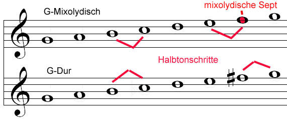 Mixolydisch im Vergleich mit Dur